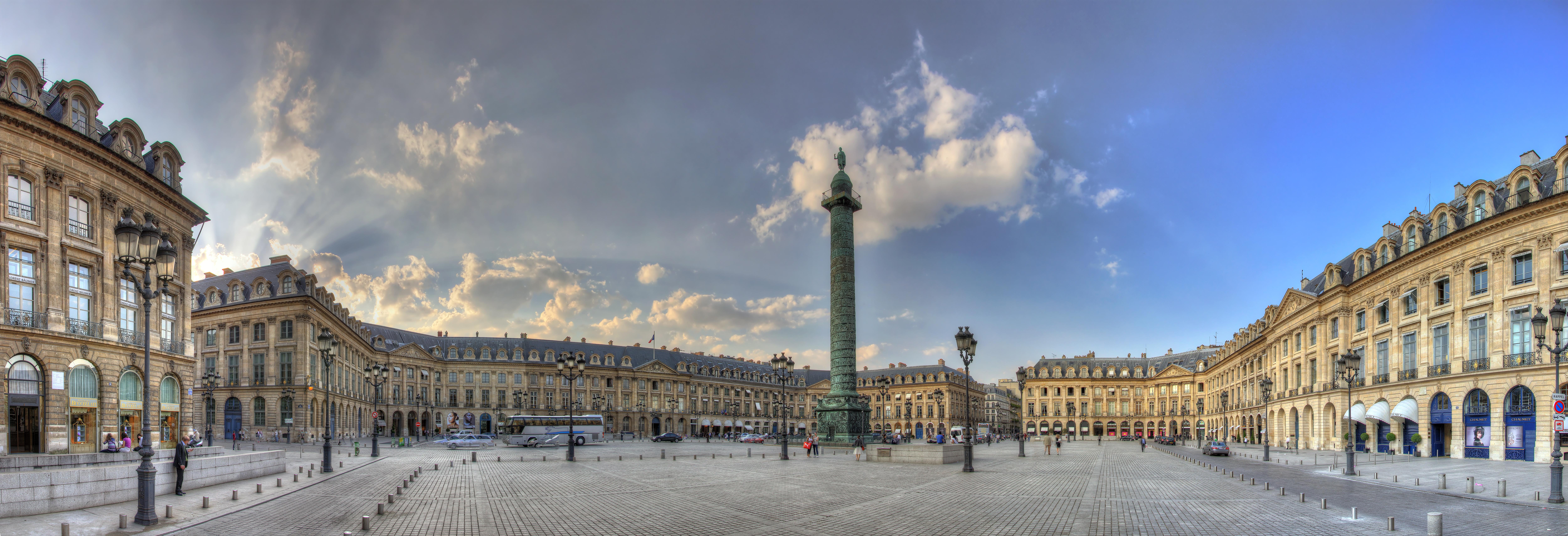 Place Vendome, Paris, France.